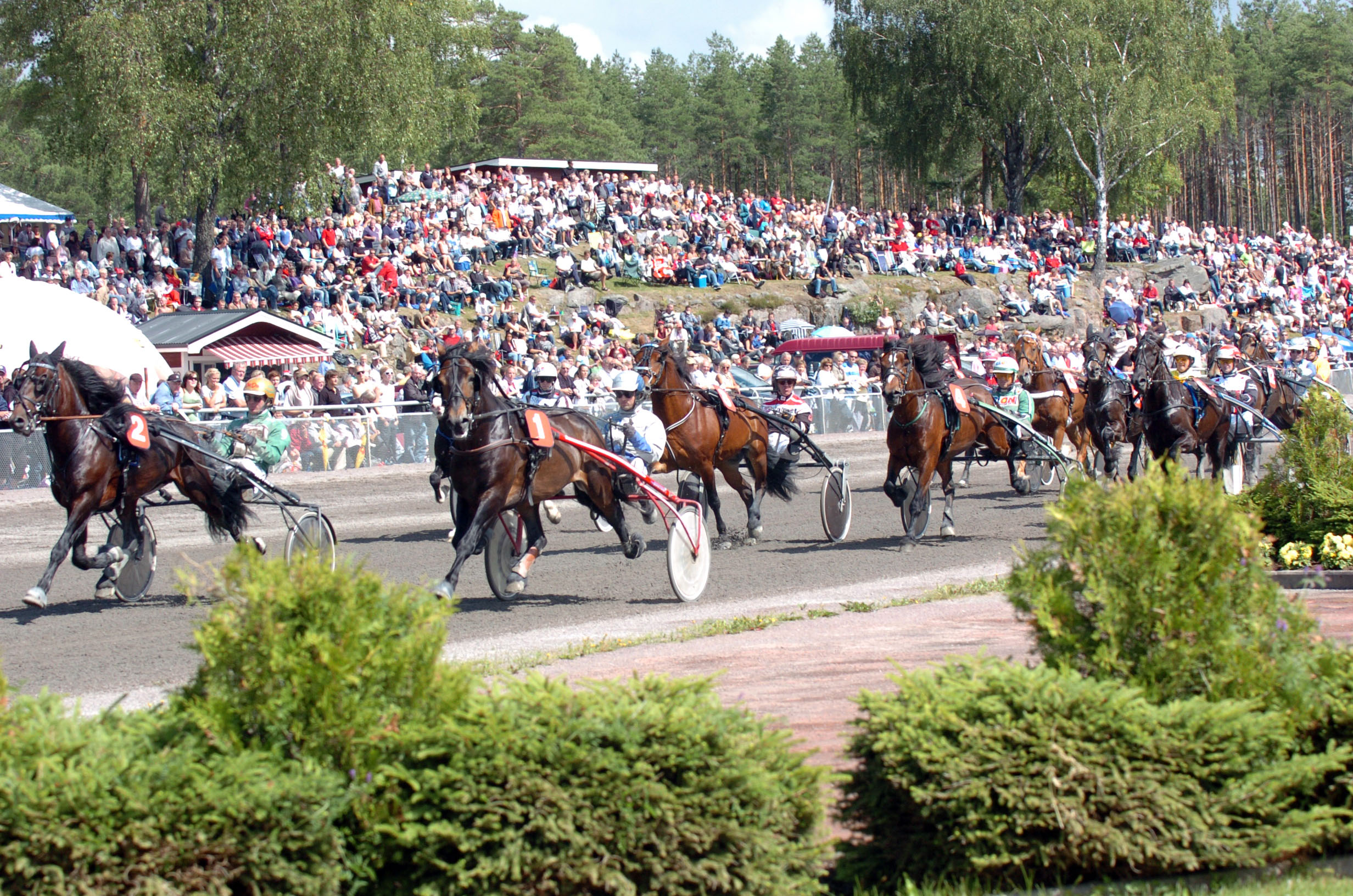 foto : ck : årjäng 080712 foto claes kärrstrand årjäng kurv vy publik